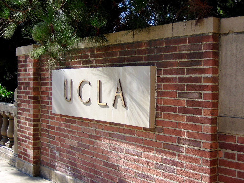 UCLA Entrance